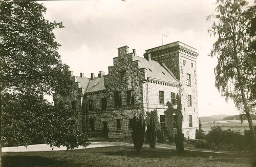 Hjuleberg manor